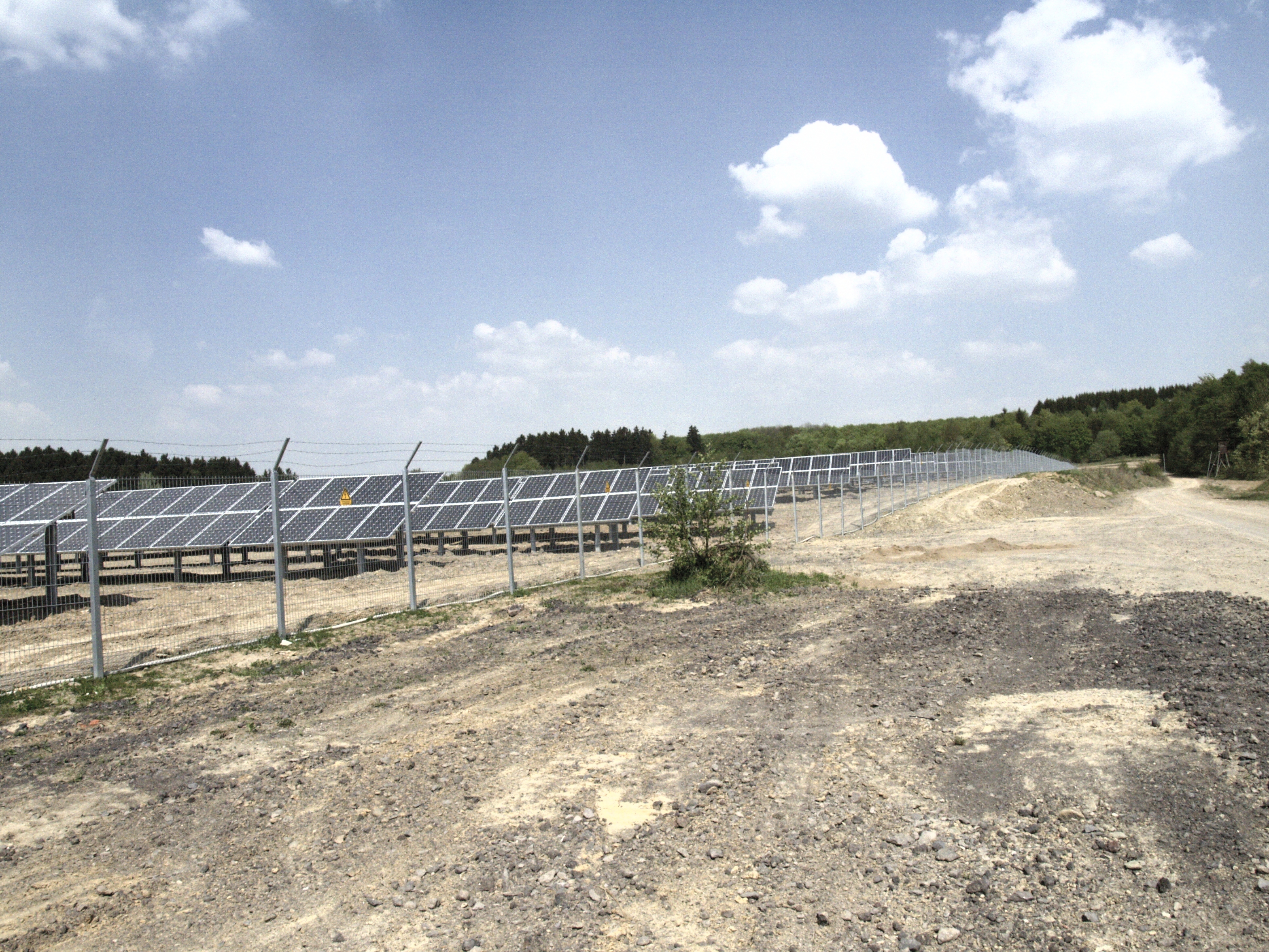 Photovoltaikanlage im Oberdreiser Wald. Die Anlage erzeugt ca. 3 Megawatt Peakleistung.